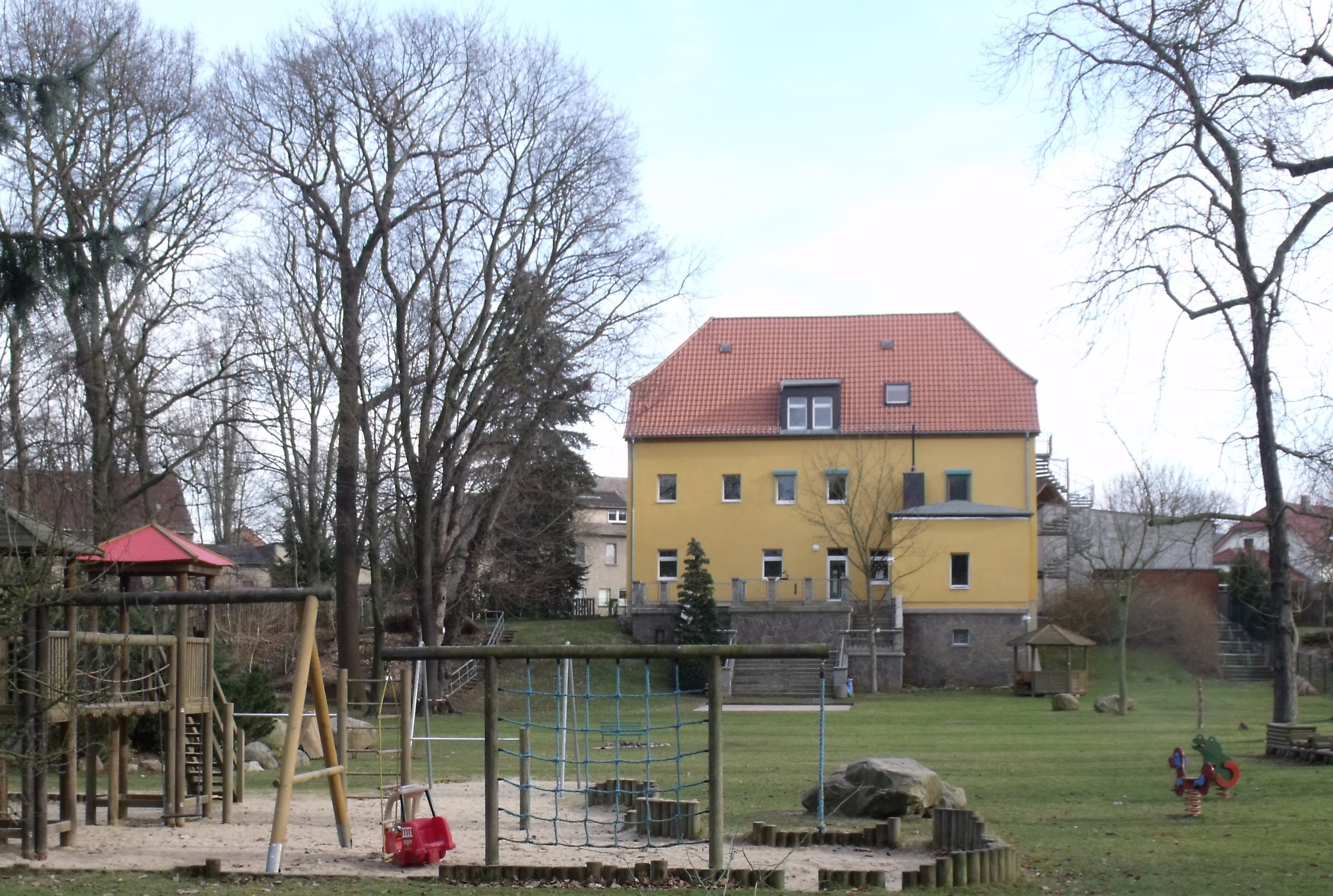 Kindergarten "Maria Franz" in Imnitz/Zwenkau bei Leipzig